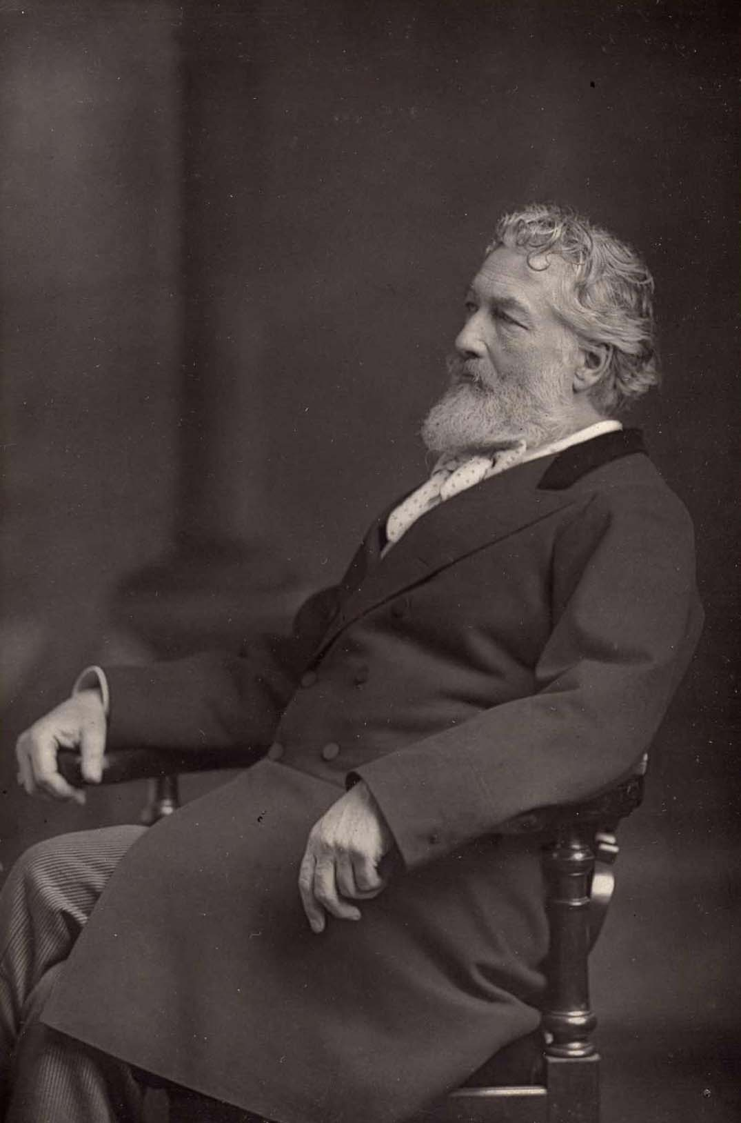 Сэр Фредерик Лейтон